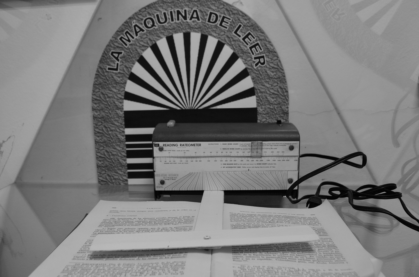 Quizás la unica pieza que existe en el país. Se trata de una máquina que se utilizó para acelerar la lectura de los expedientes o libros.